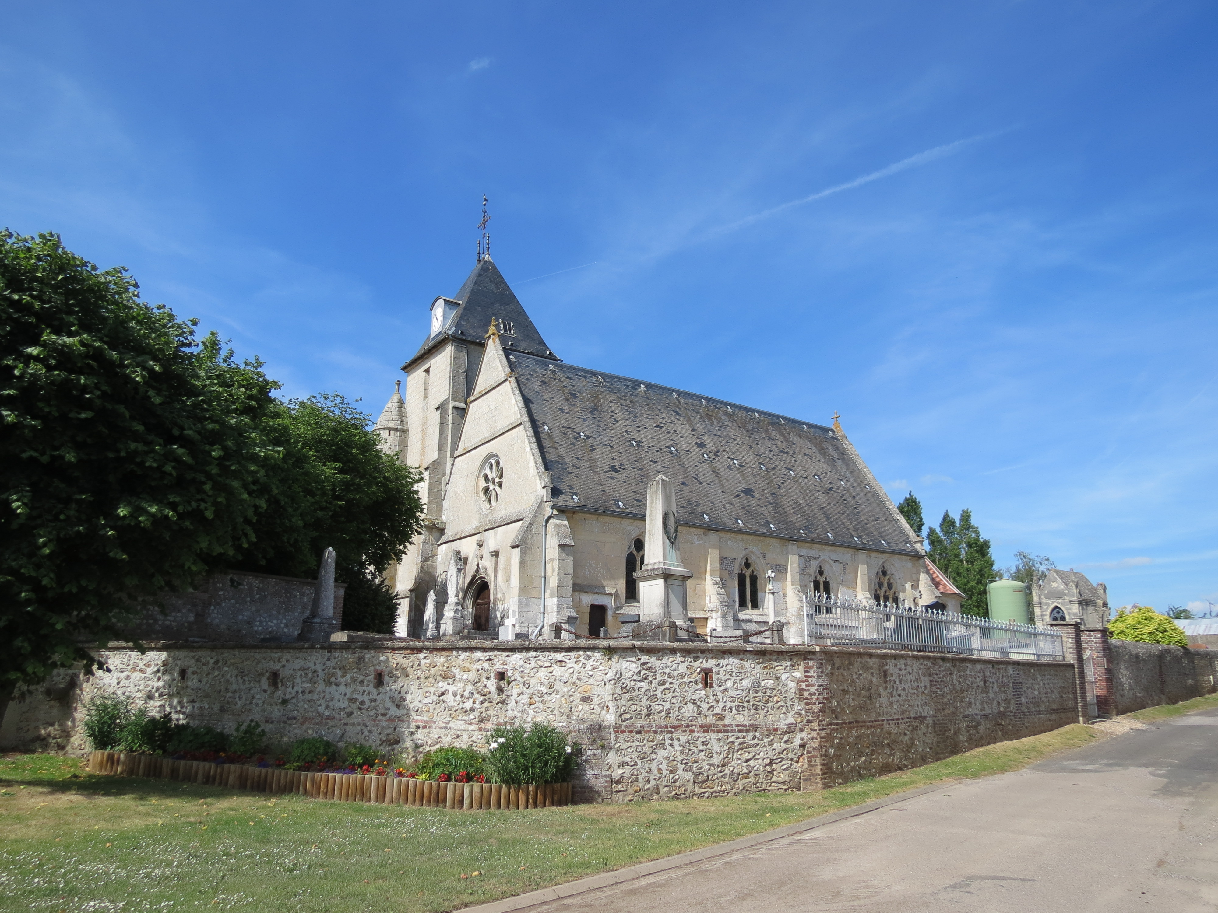 Église Saint-Sulpice de Vatteville.